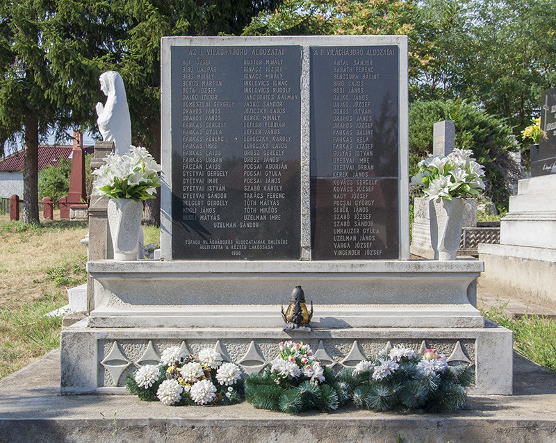 I. és II. világháborús emlékmű Tófalu temetőében